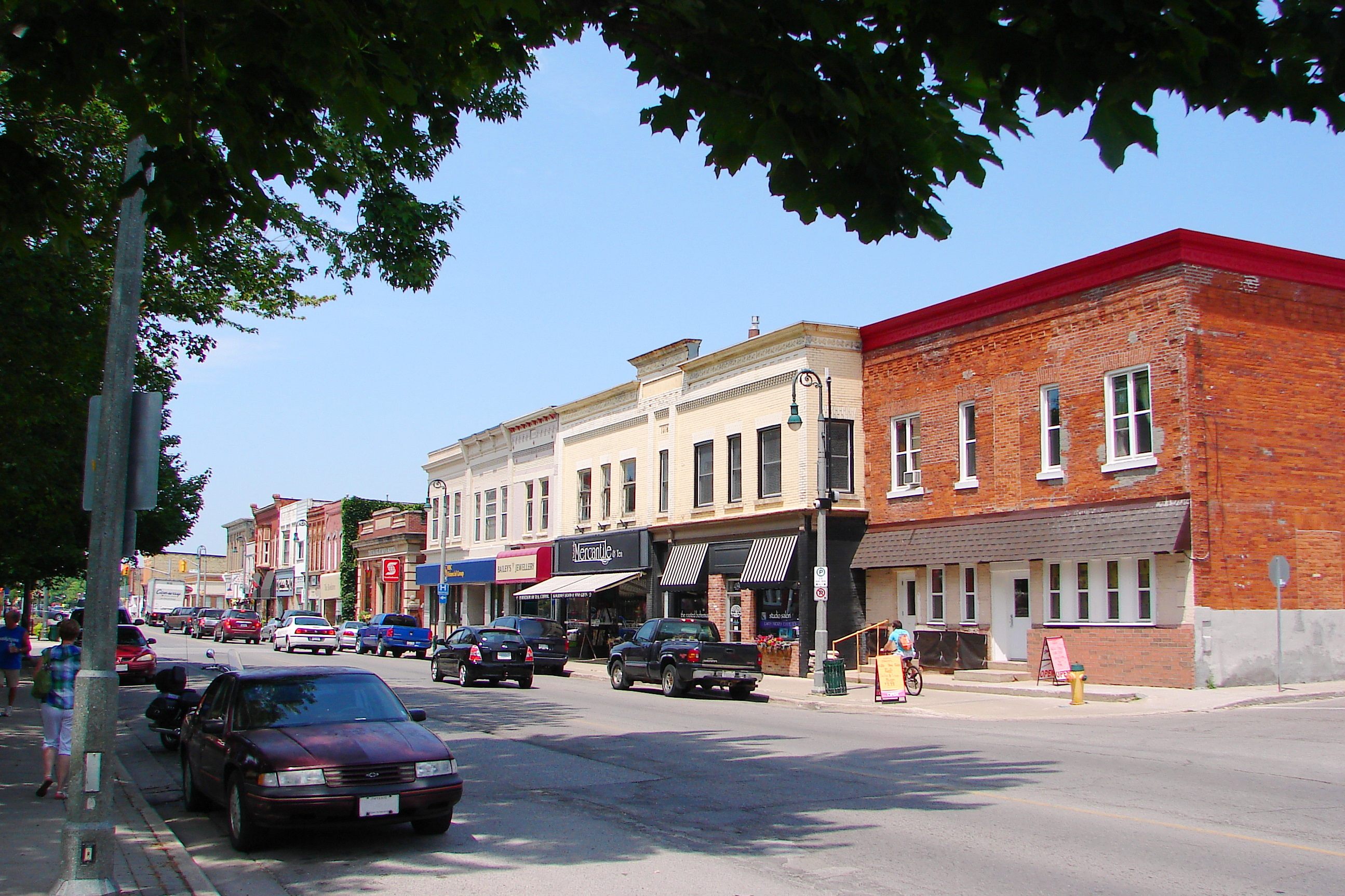 Petrolia, Ontario, Canada